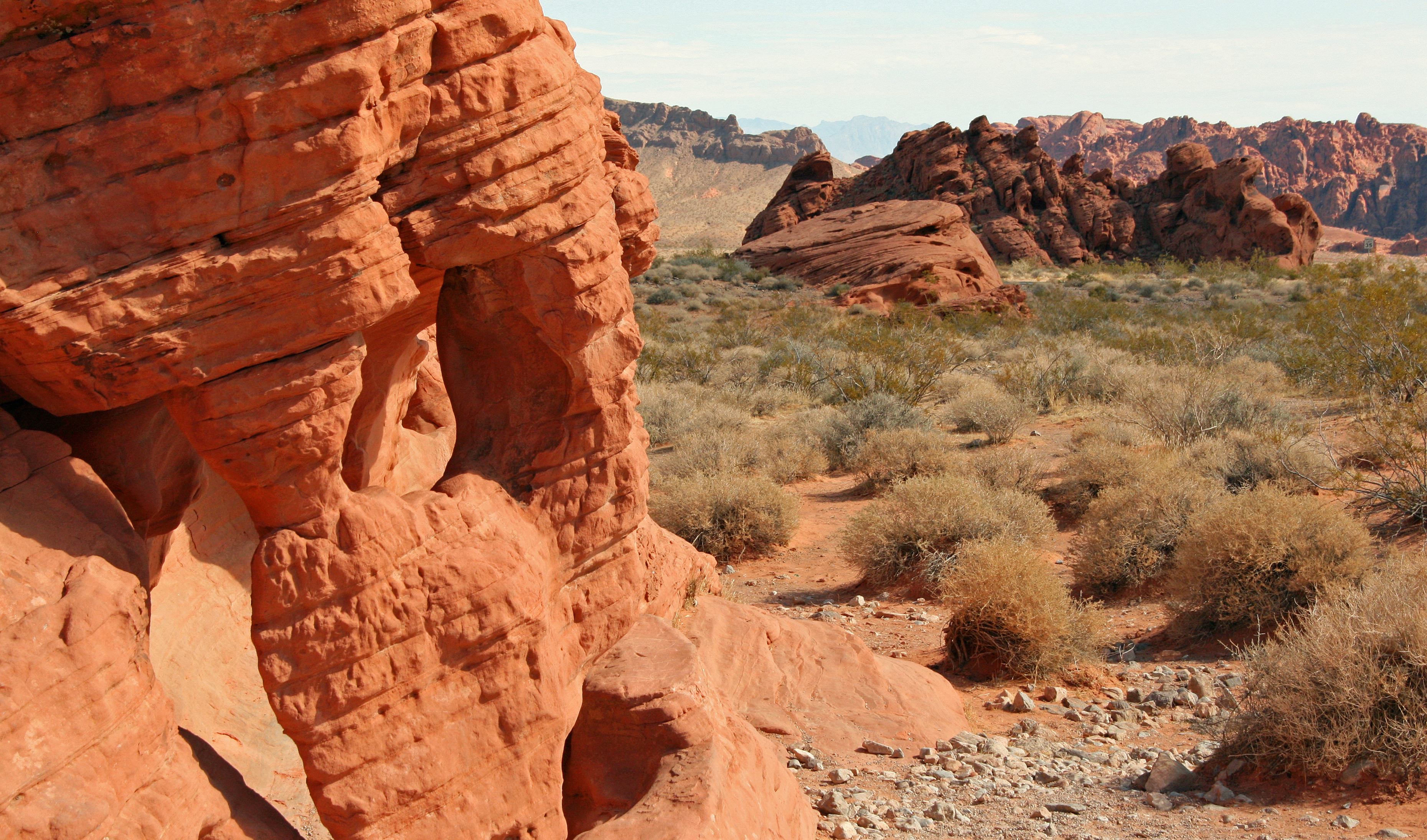 La Vallée du Feu dans l'état du Nevada